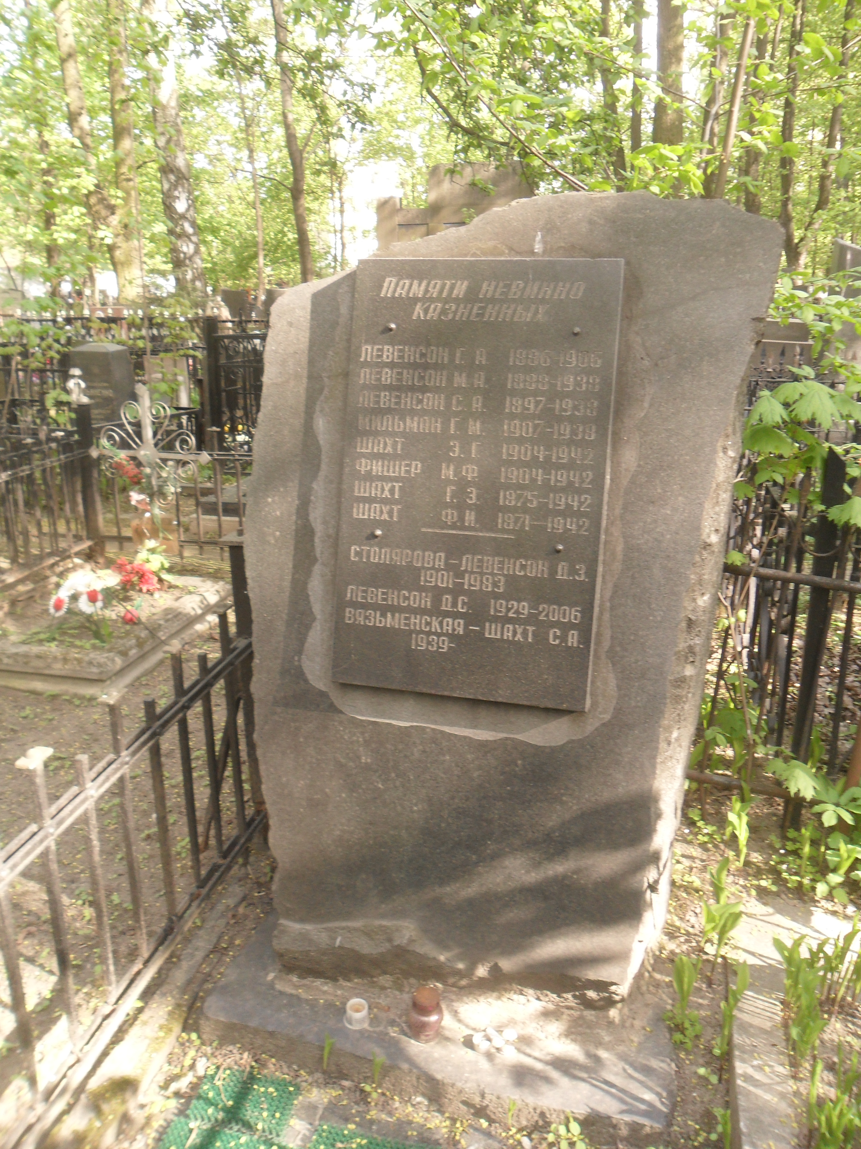 Кенотаф Герою Советского Союза Эрнсту Шахту и другим репрессированным на Введенском кладбище Москвы.